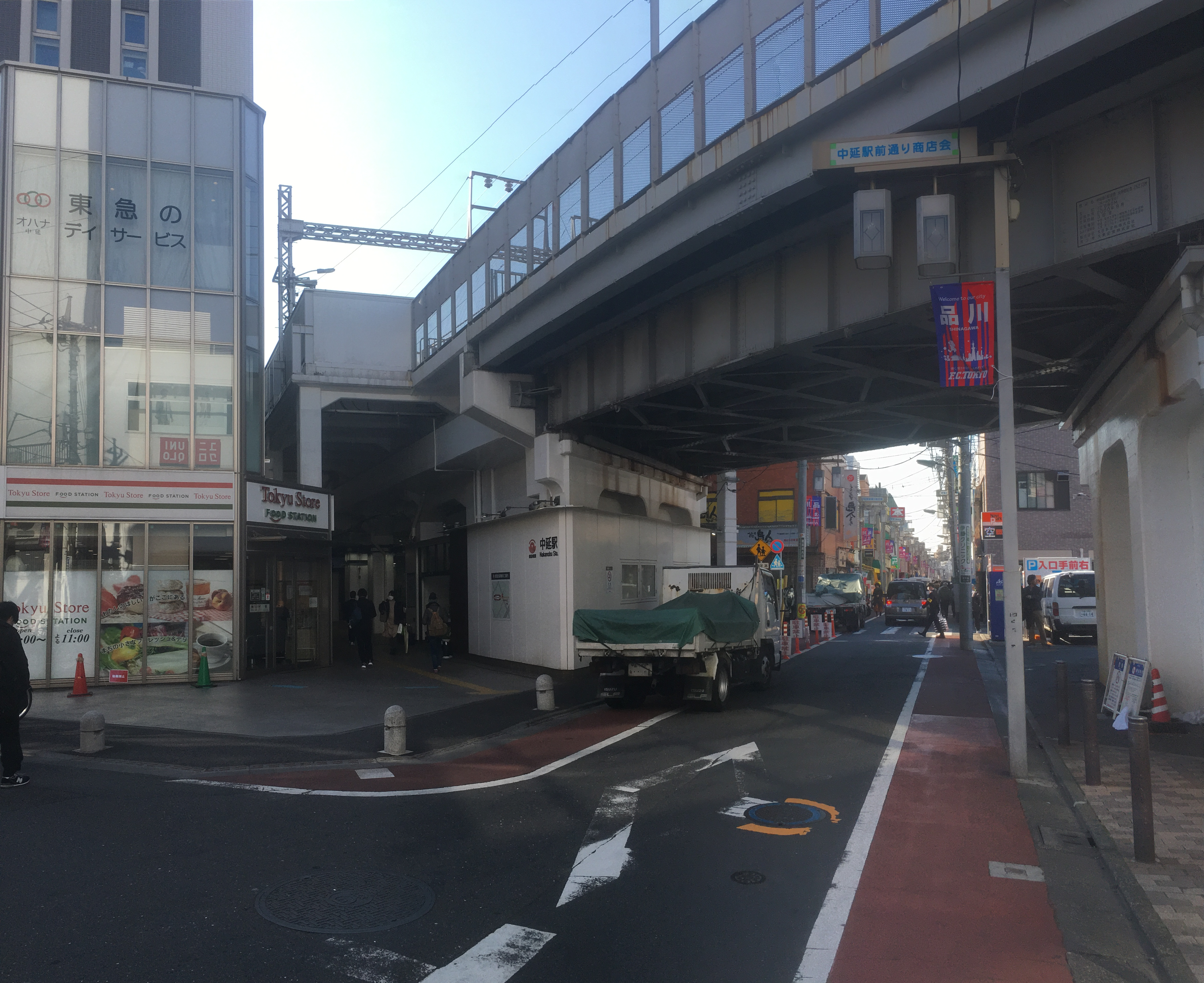 中延駅 (Nakanobu Station)